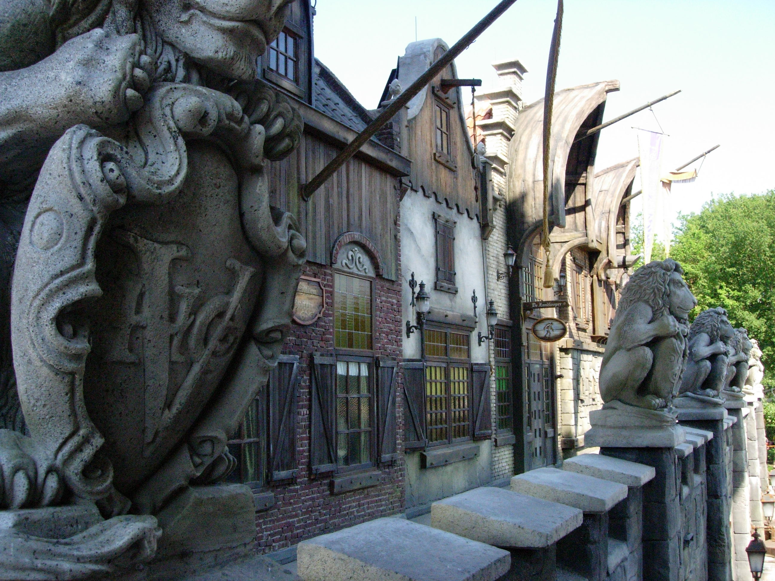 Premier étage du Vliegende Hollander